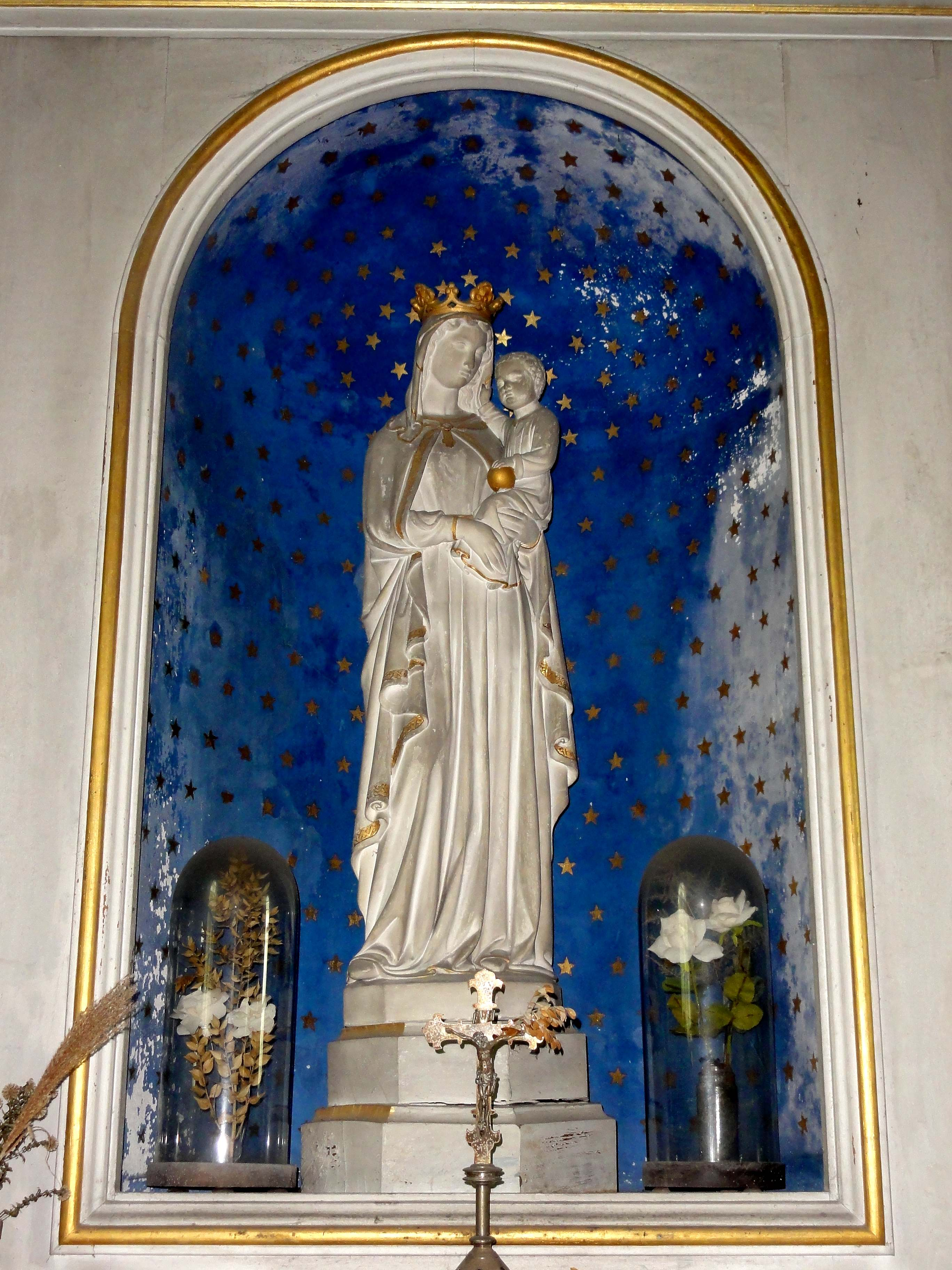 Interieur de l'église (voir titre).